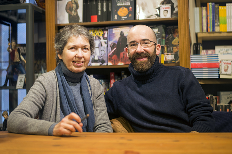 Dominique Roques et Alexis Dormal, mère et fils, auteurs de bande dessinée.